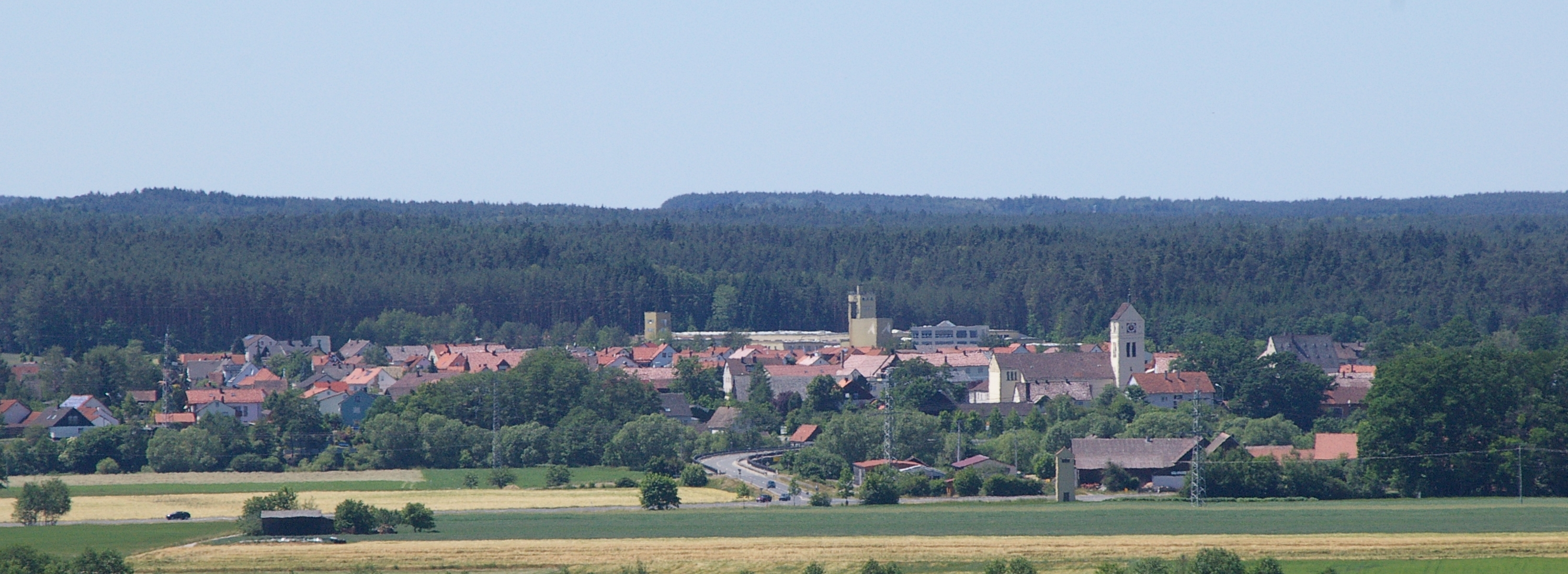 Oberwildenau, Blick von Osten